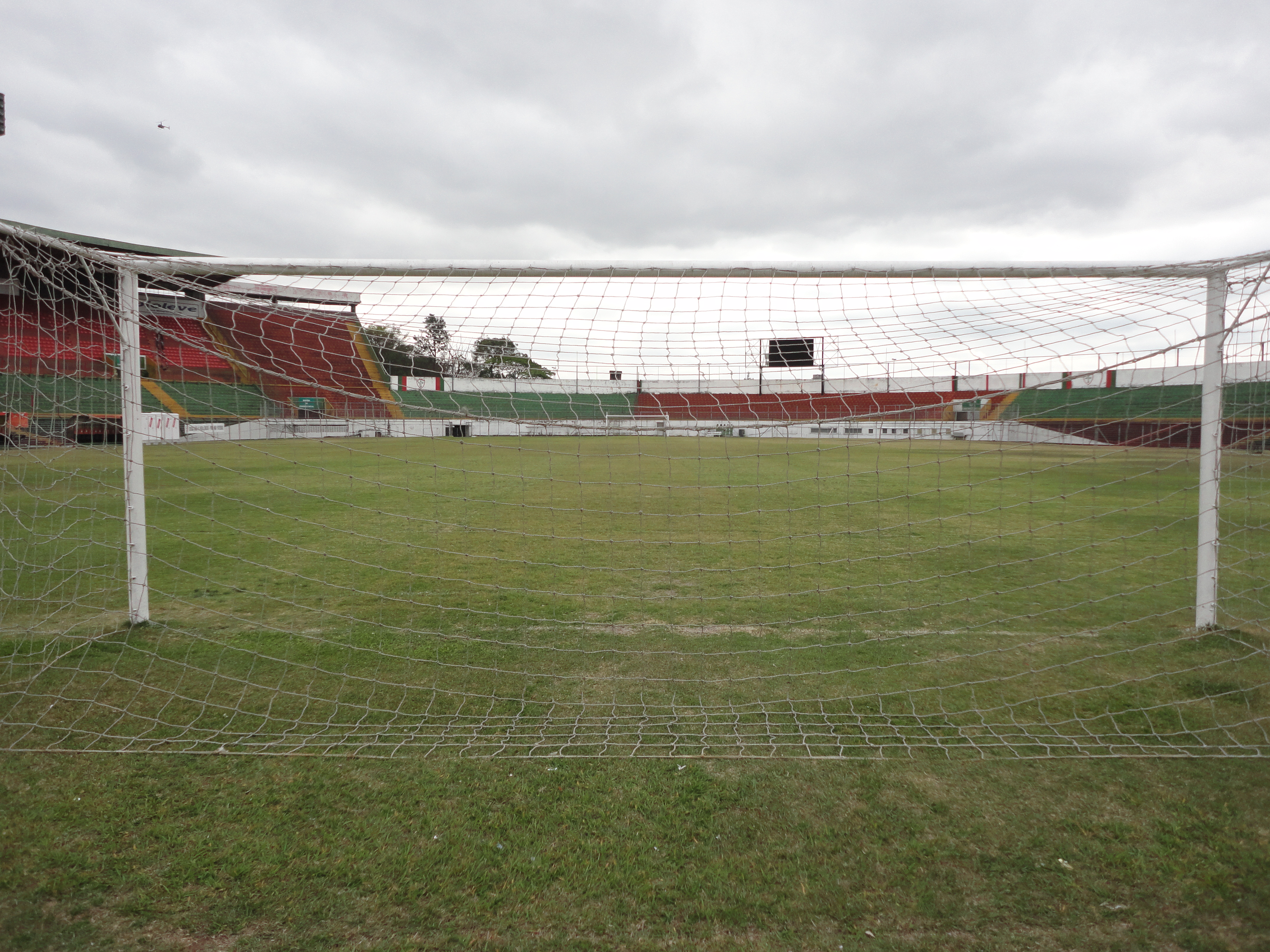 Vista do gramado do Canindé, em São Paulo, Brasil